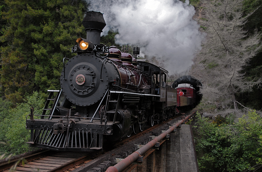 06 14 09 053xxRP